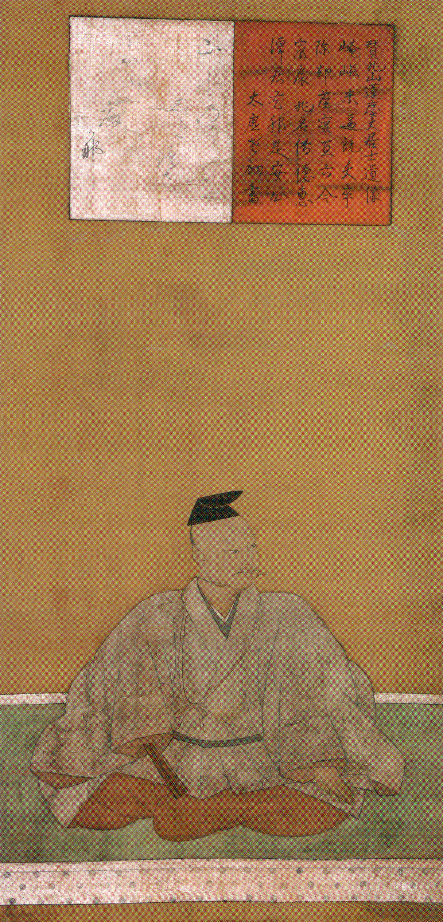 相良晴廣像 （室町時代/16世紀作）